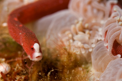 Bulbonaricus brauni en la isla de Ani, Ogasawara, Japón, profundidad: 24 m, talla: 5 cm